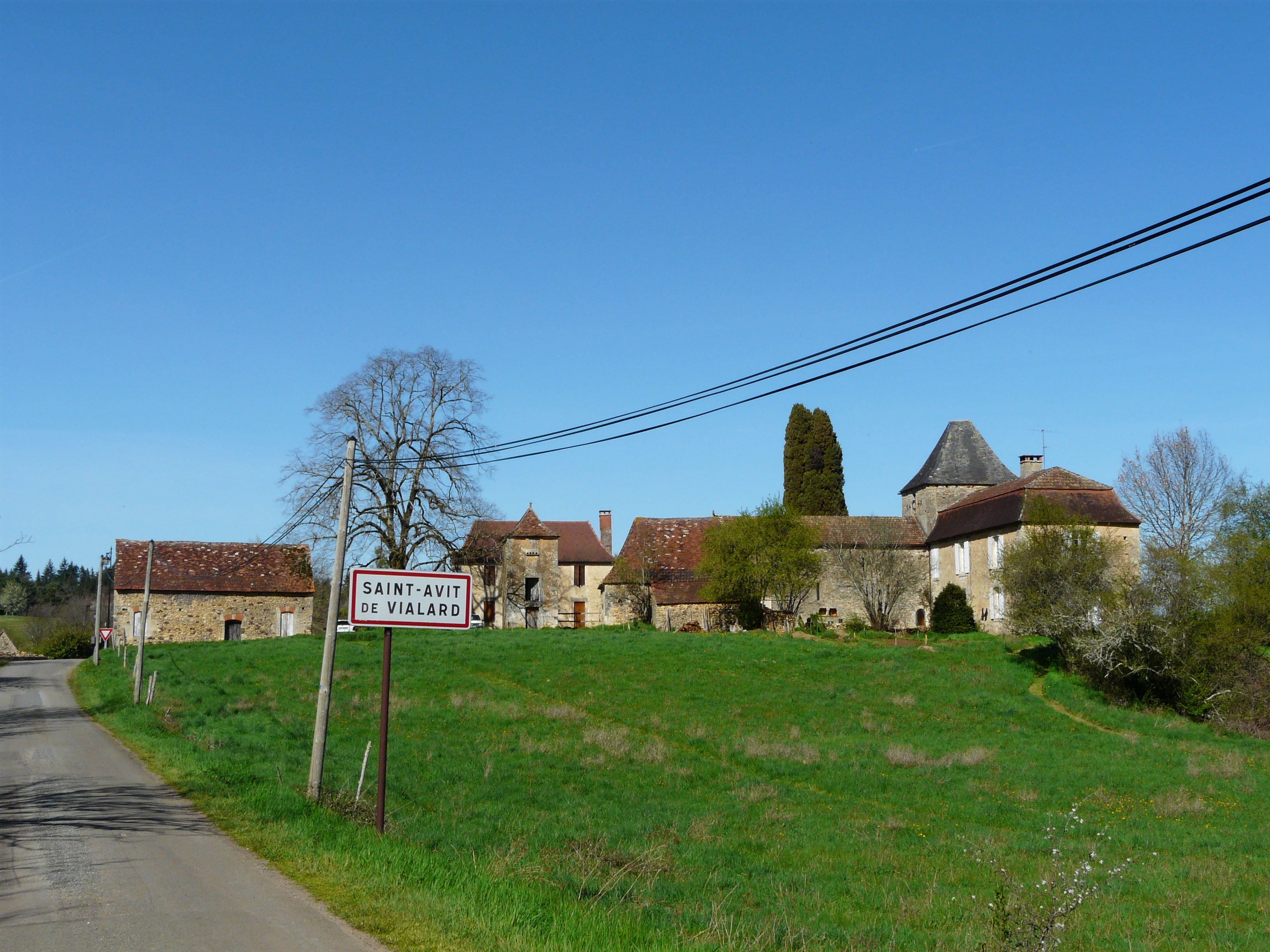 Le village de Saint-Avit-de-Vialard, Dordogne, France.